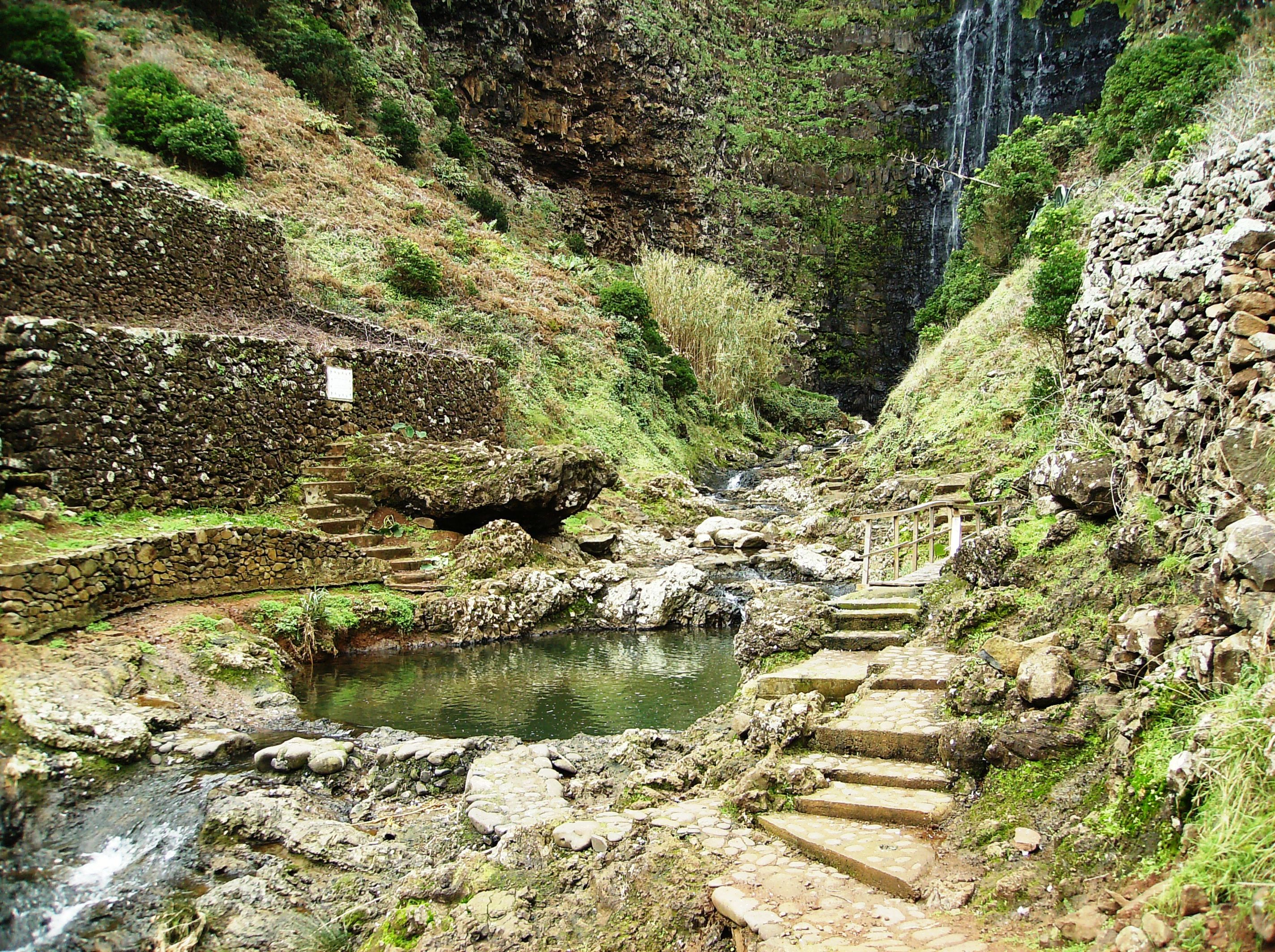 Lagar de Diogo Santos Faleiro, Ilha de Santa Maria (Açores), Portugal.